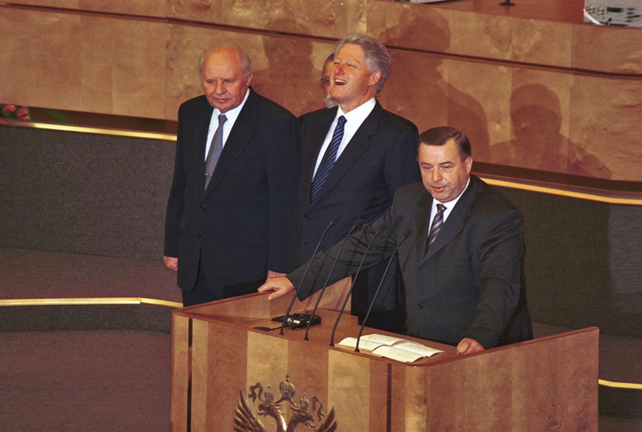 Председатель Совета Федераций Е.С.Строев, Президент США Б.Клинтон, Председатель Государственной Думы Г.Н.Селезнёв. Зал пленарных заседаний. 3 июня 2000г. фото А.Б.Галеева